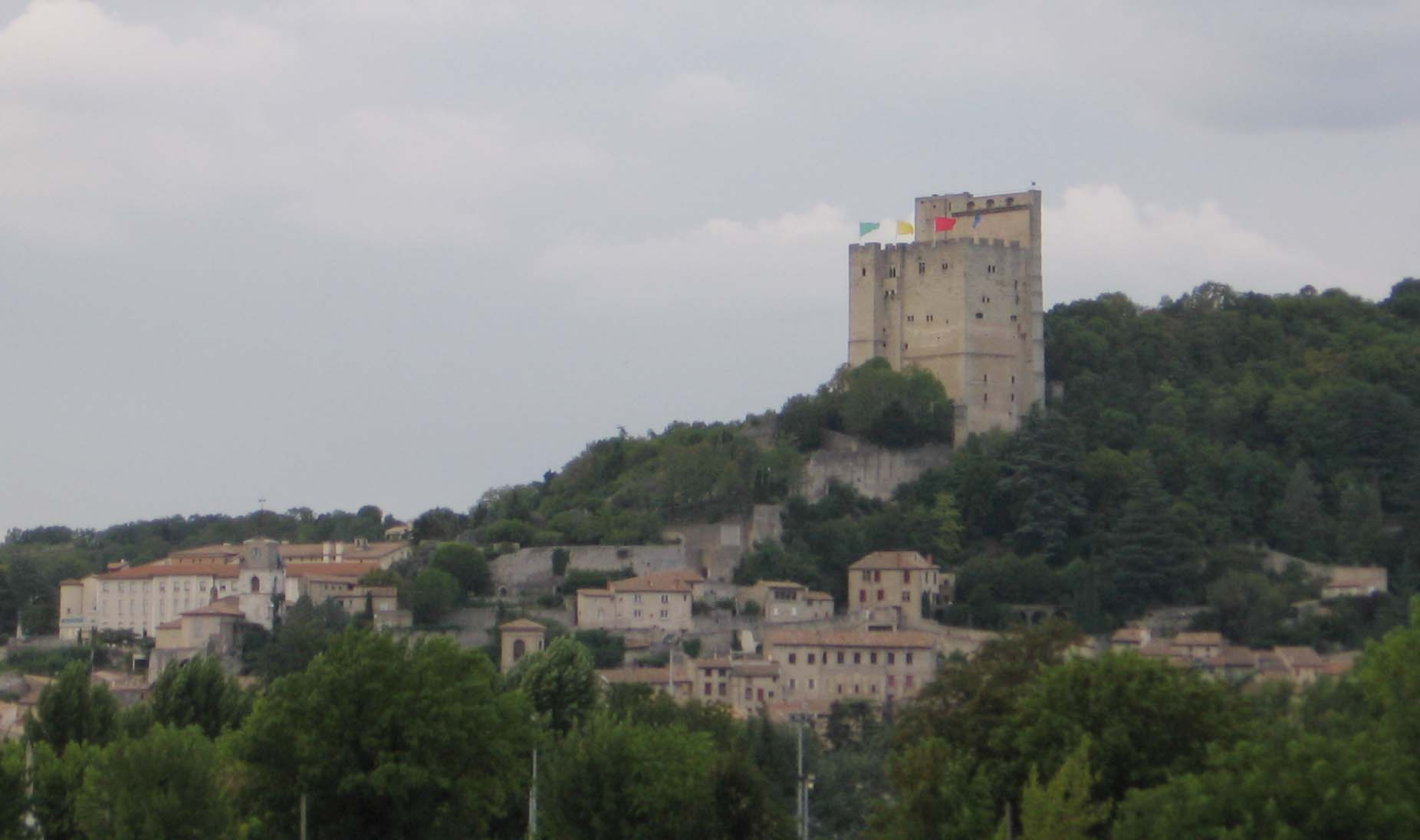 Crest, donjon, Drôme , France